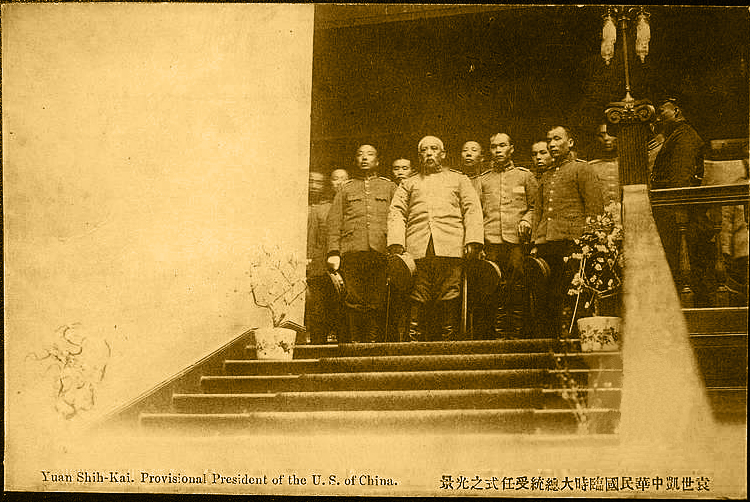 袁世凯中华民国临时大总统受任式之光景